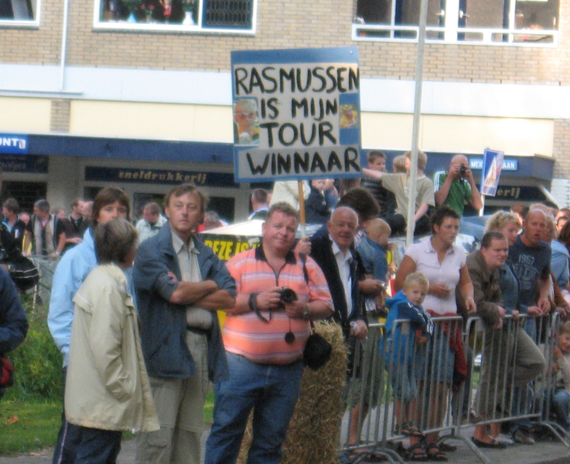 Rasmussen is mijn tour-winneaar (vind ik ook :P)